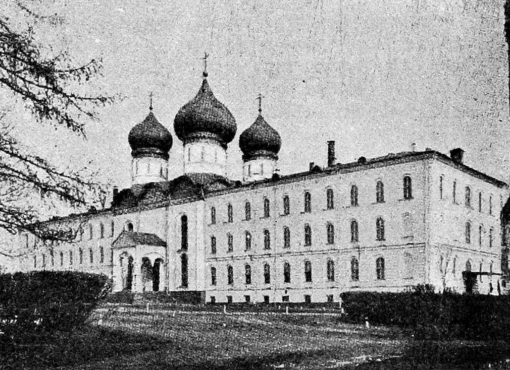 Измайловская богадельня (главный корпус).. Это изображение было использовано для иллюстрирования статьи «Инвалидные дома» опубликованной в десятом томе «Военной энциклопедии», который был издан книгоиздательским товариществом И. Д. Сытина в 1912—1913 гг. в столице Российской империи городе Санкт-Петербурге.